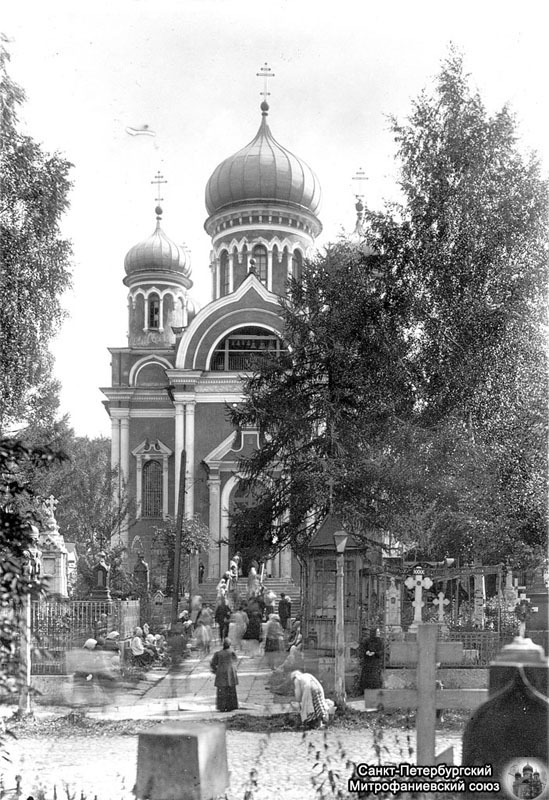 Церковь во имя Святителя Митрофана Воронежского на Митрофаниевском кладбище в Санкт-Петербурге, архитектор К.А. Тон, построена в 1839-1847 гг., снесена в 1929 г.